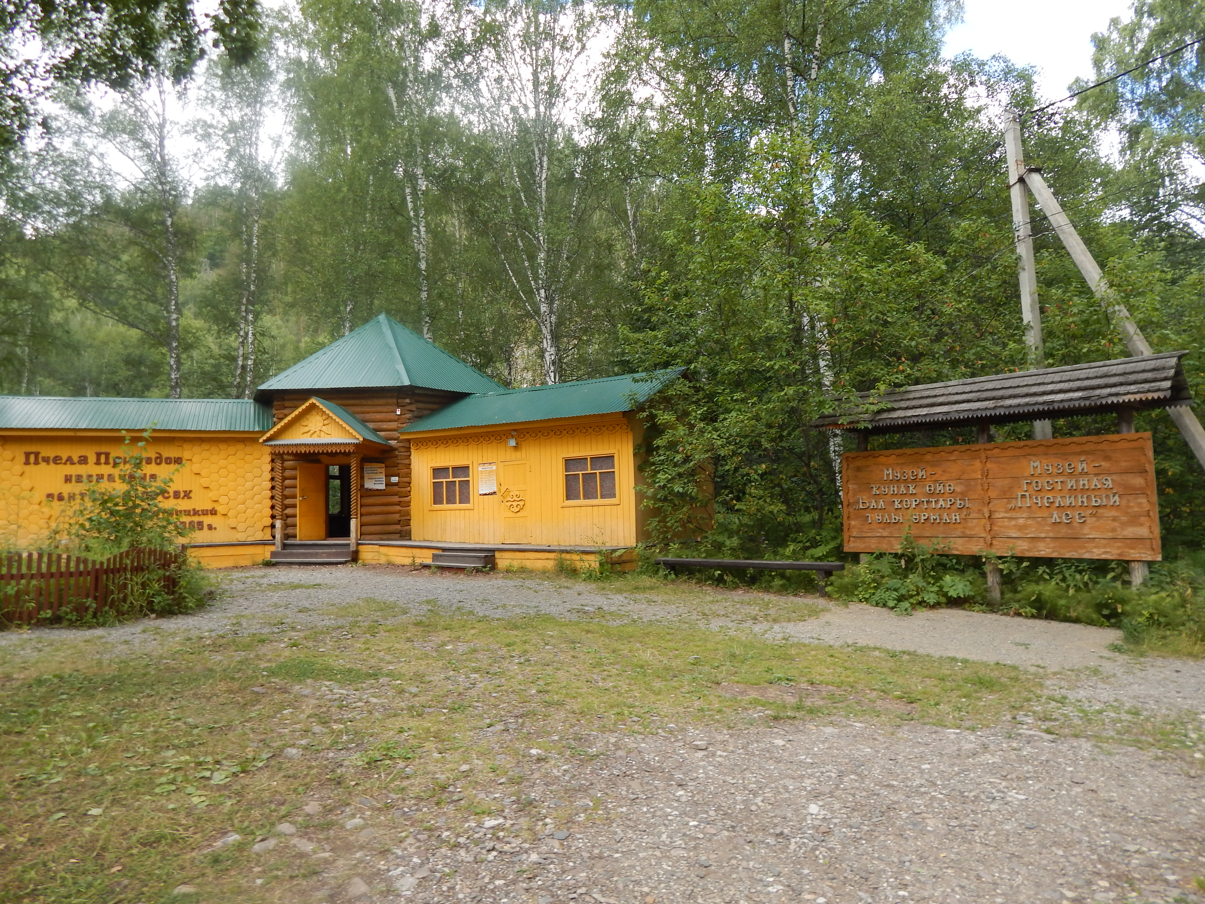 Музей пчеловодства по дороге в пещеру Шульганташ